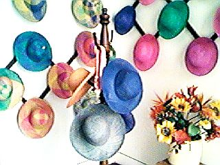 Artesanías campechanas, sombreros.